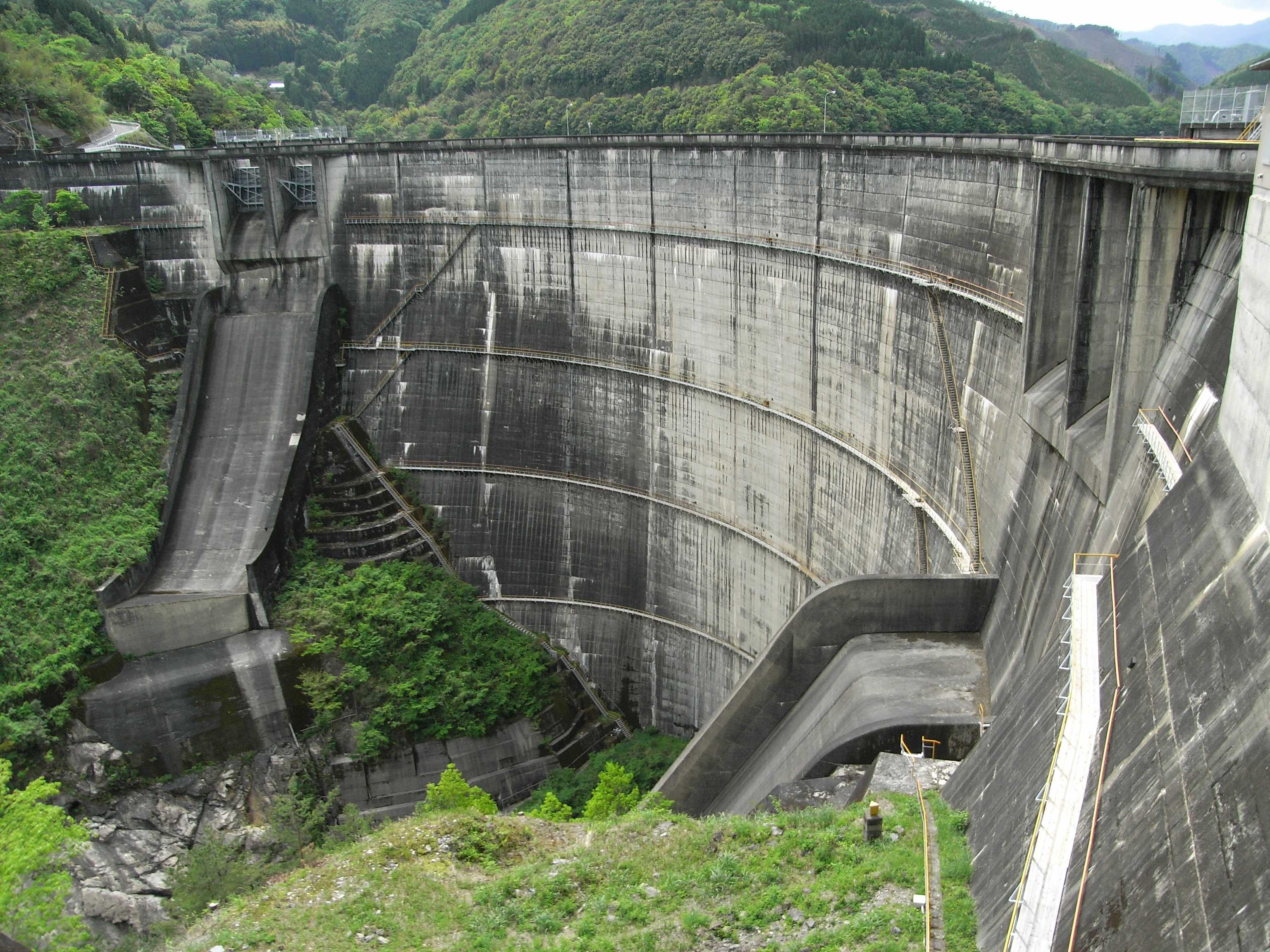 Dam